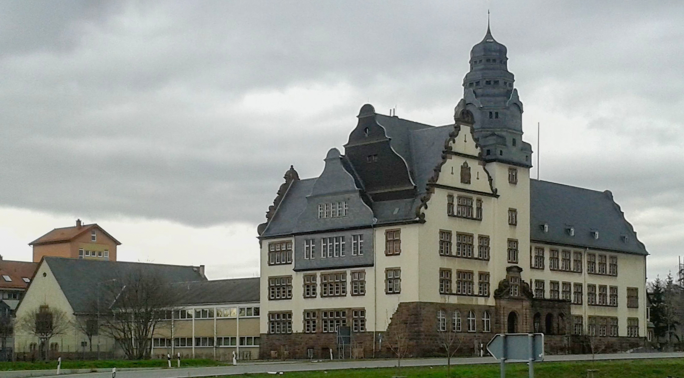 Ernst-Ludwig-Schule in Worms, Rheinland-Pfalz; Blick von Südosten